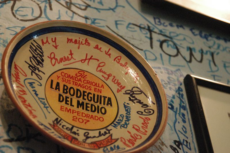 Cuba, juli 2004, info in de Metadata